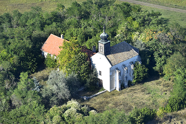 A botpusztai templom légifelvételen